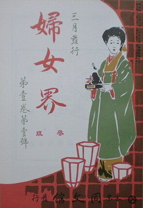 『婦女界』、同文館、1910年3月